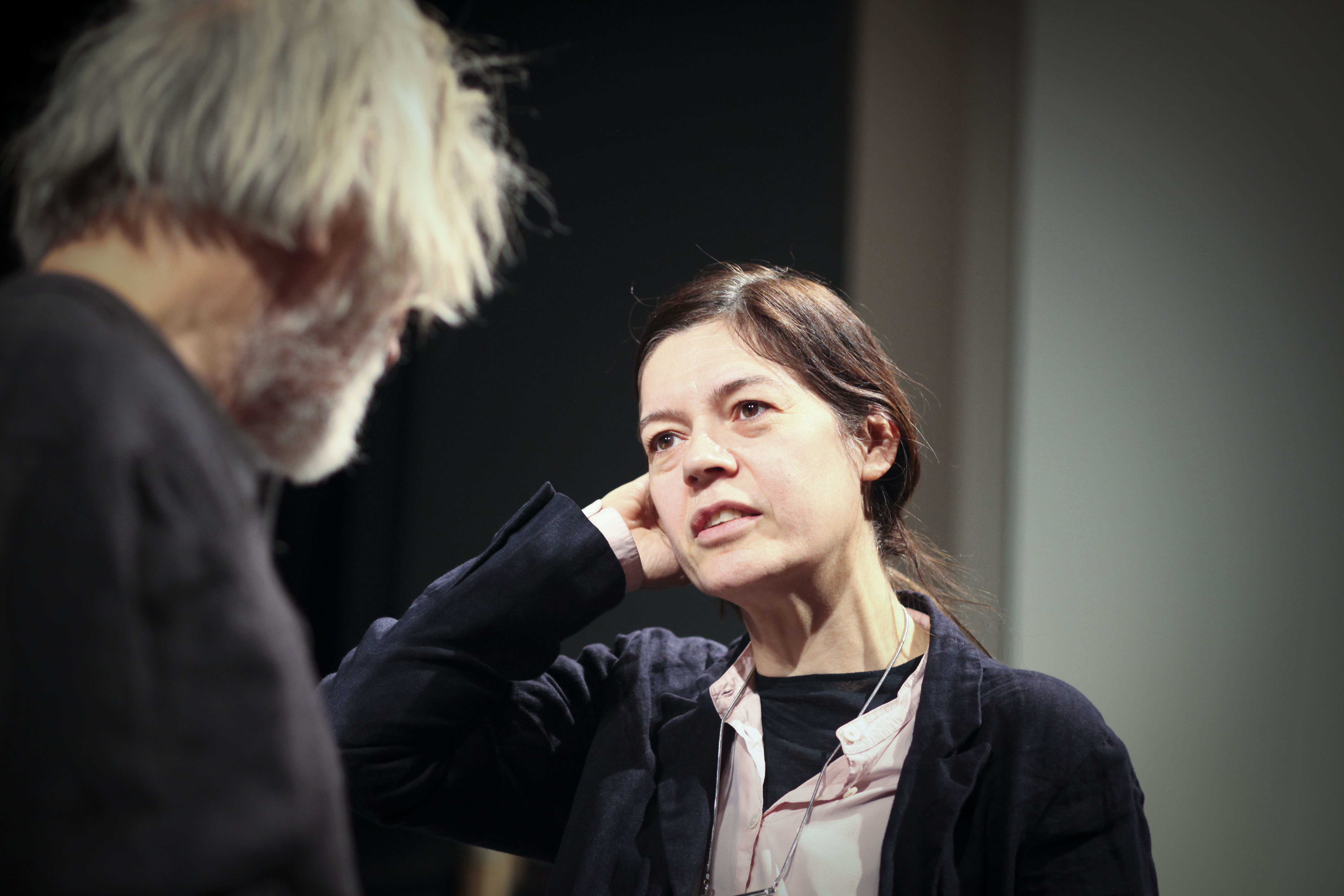 Ute Meta Bauer